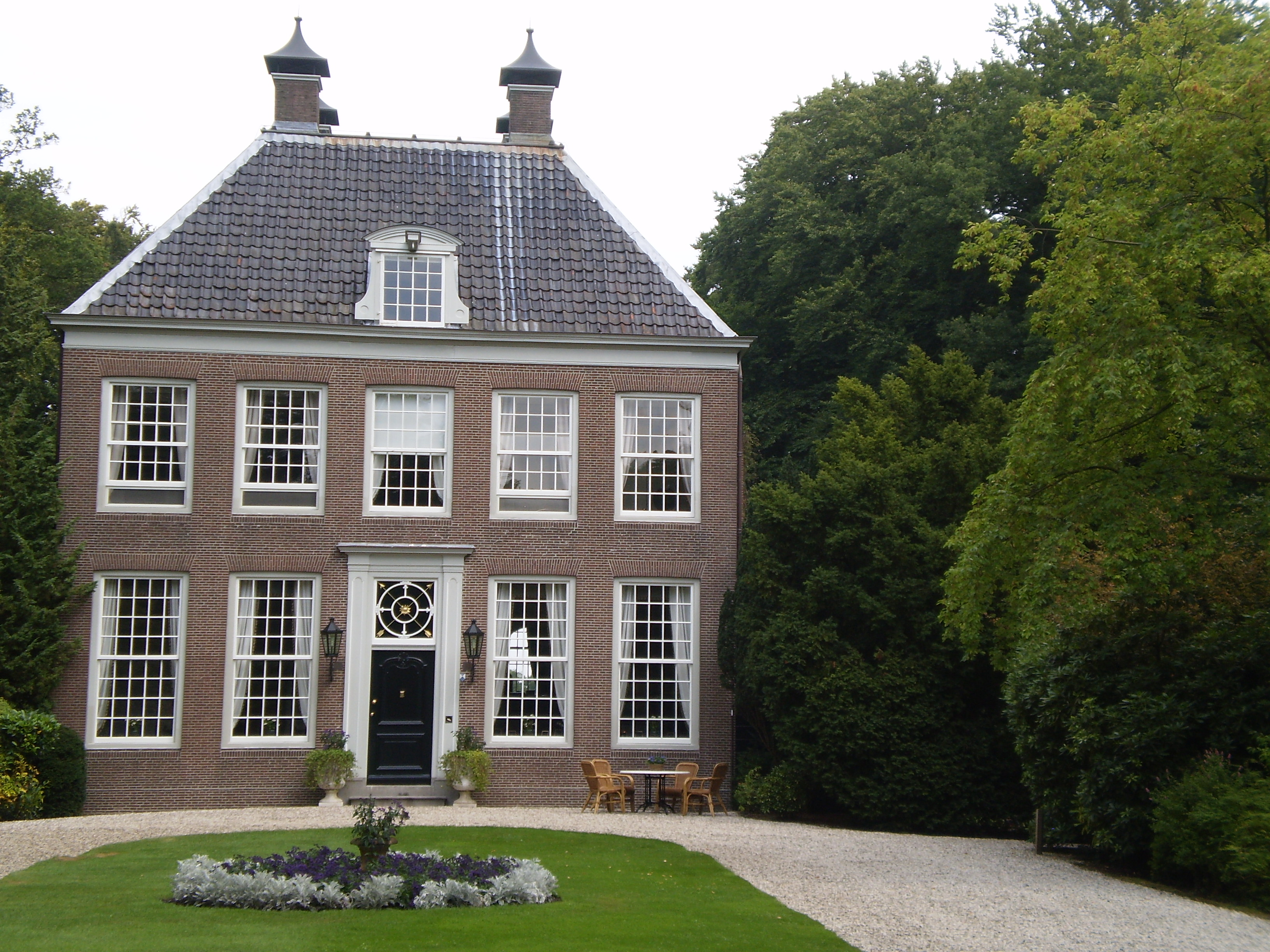 Lyts Drakestein. Foto oanbean troch Swarte Kees op 10 augustus 2009